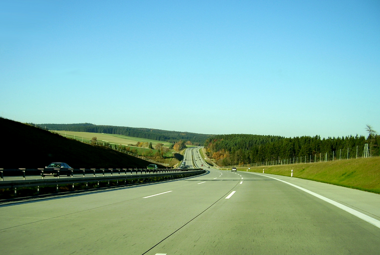 Autobahn A9